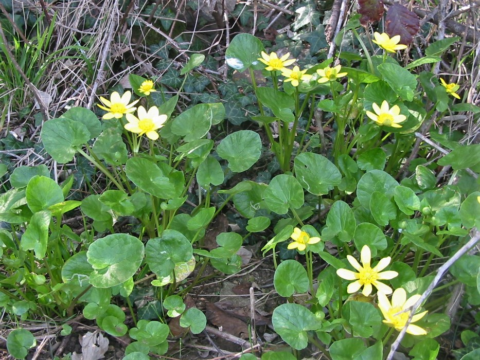 ficaire